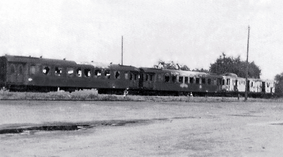 Von französischen Tieffliegern am 13. März 1945 zerschossene Waggons, zurückgezogen in den Markgröninger Bahnhof